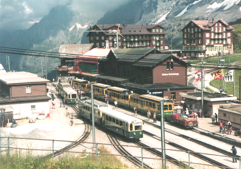 Kleine Scheidegg, mat den Zich fir rop op d'Jungfraujoch